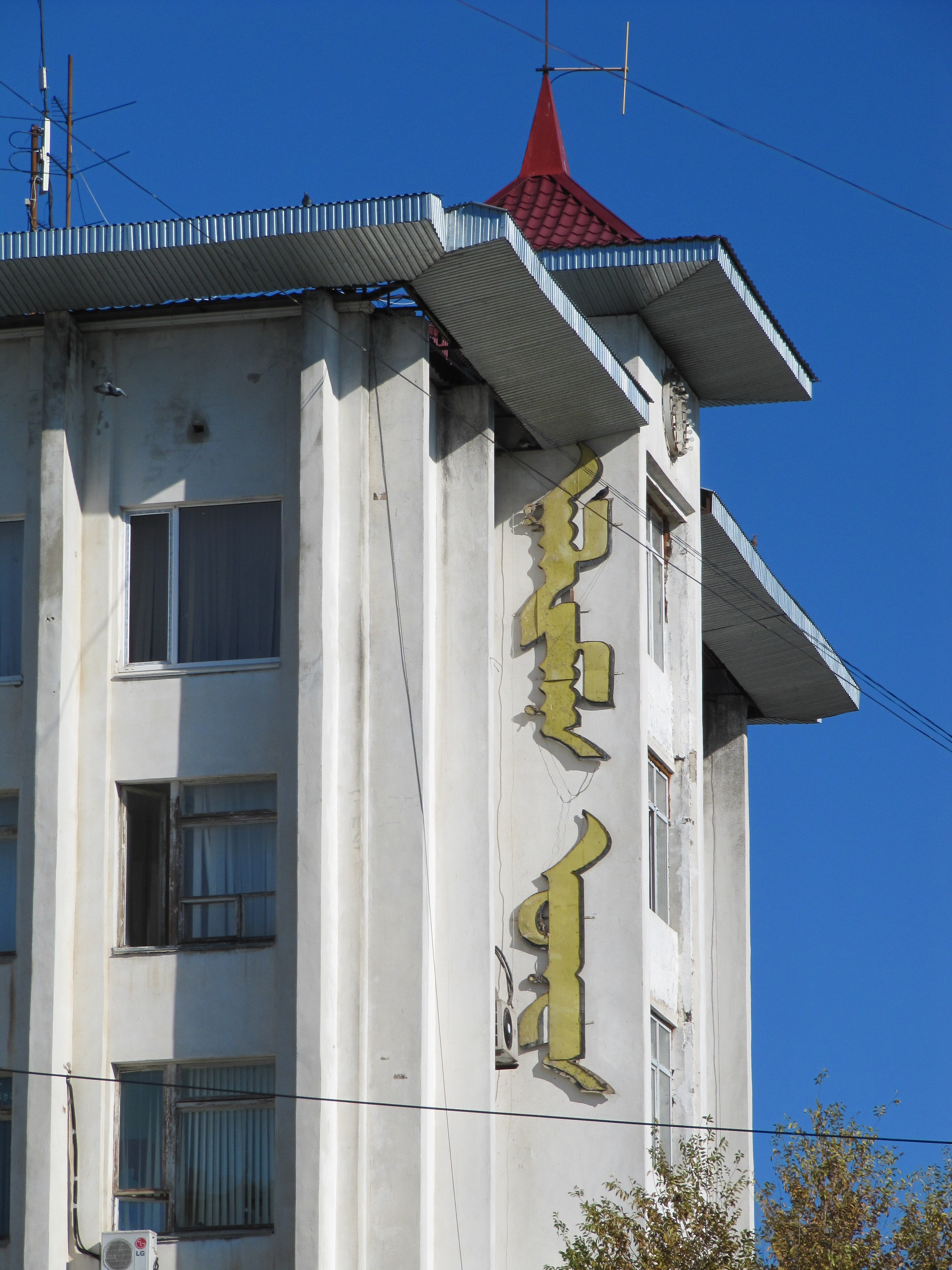 Надпись на тодо-бичиг на одном из зданий в Элисте, Калмыкия